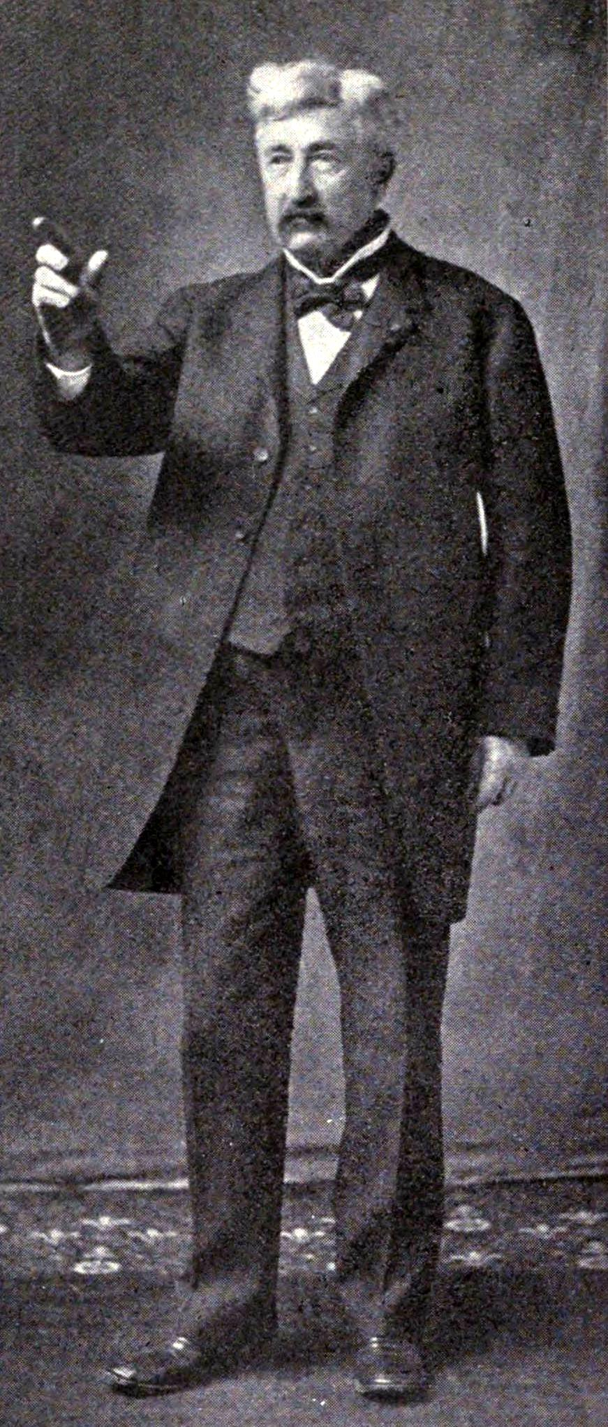 Vespasian Warner, 1904